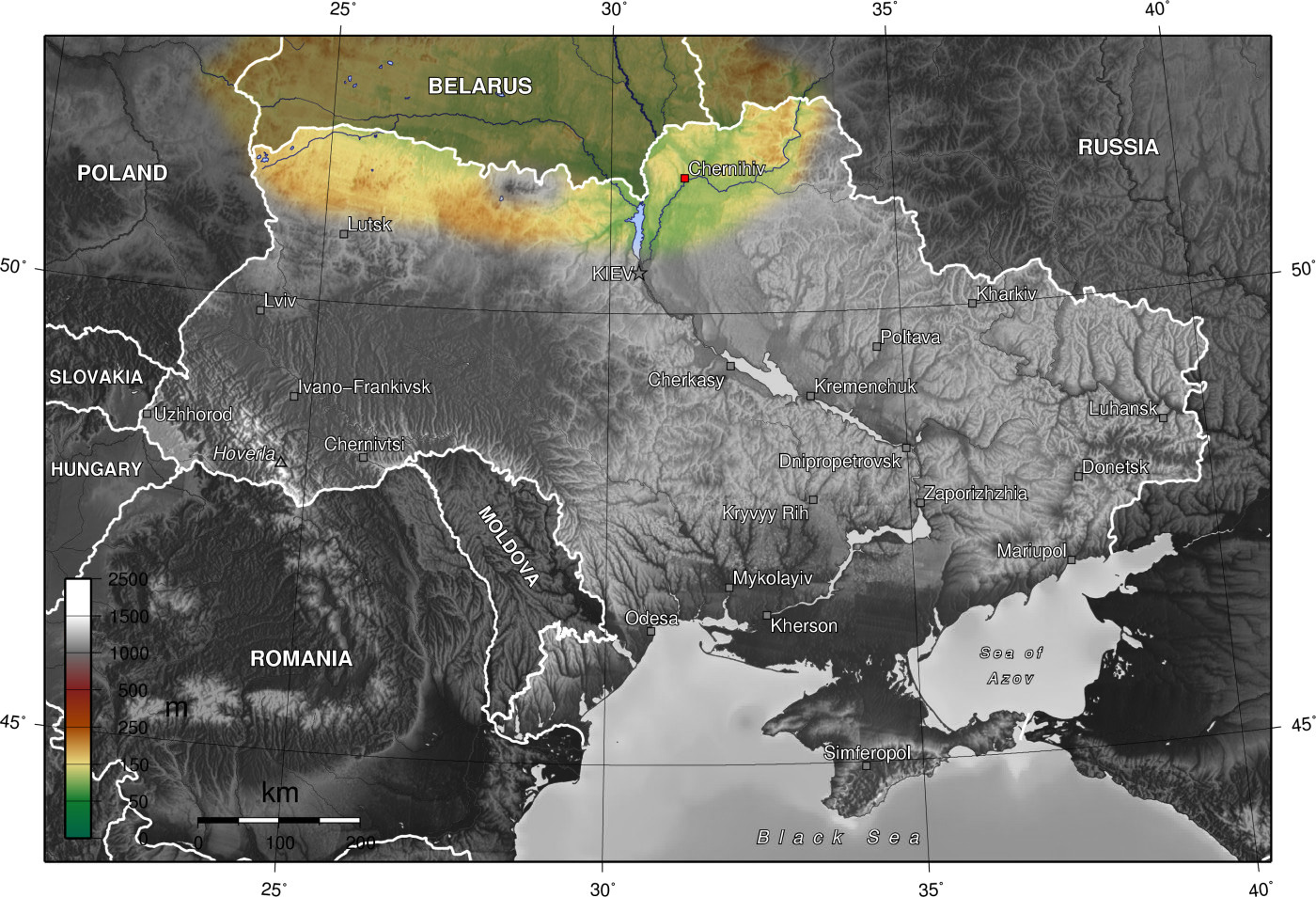 Ukraine_Polissya_depression